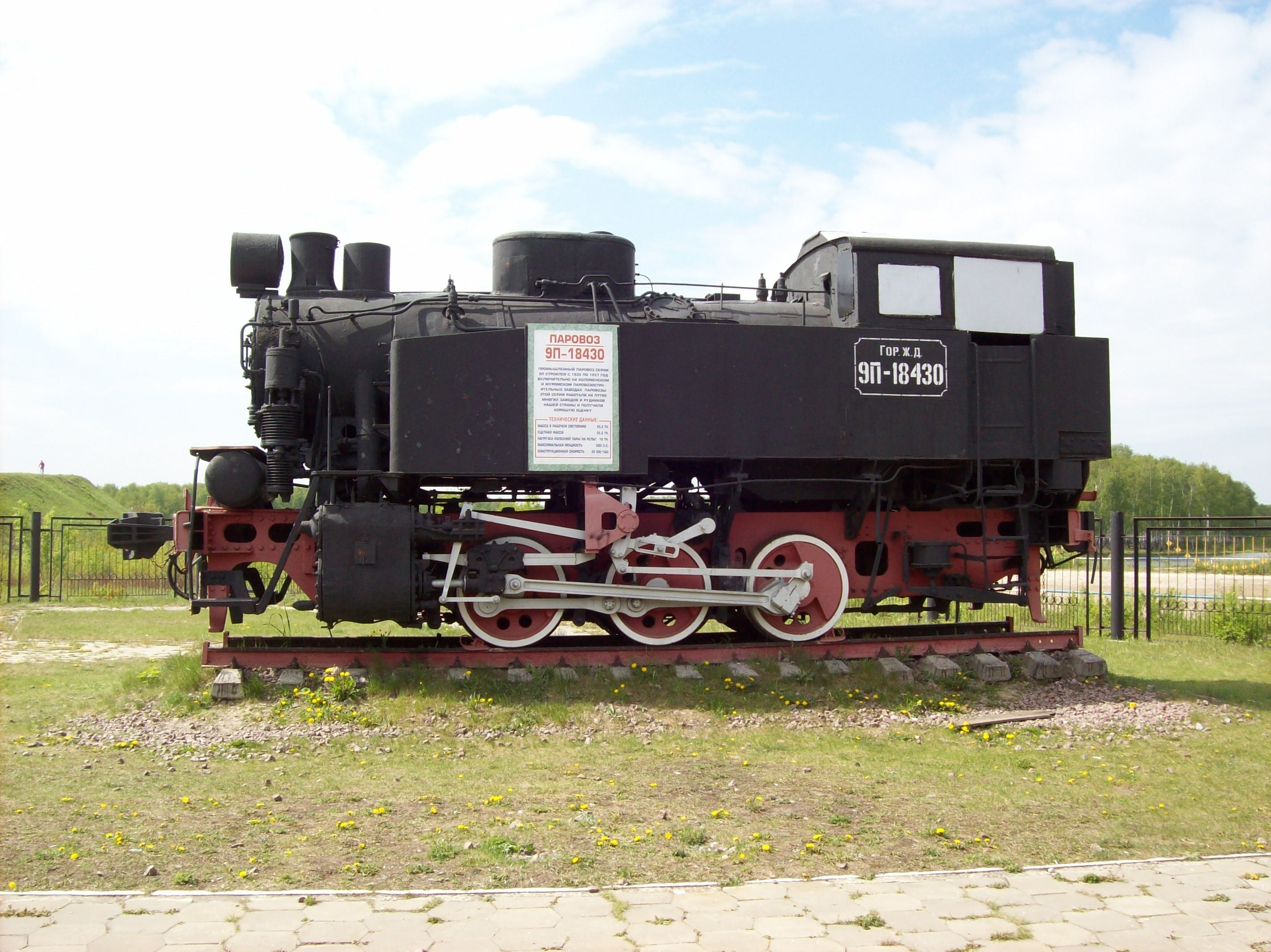 Lokomotive 9P (Паровоз 9П)